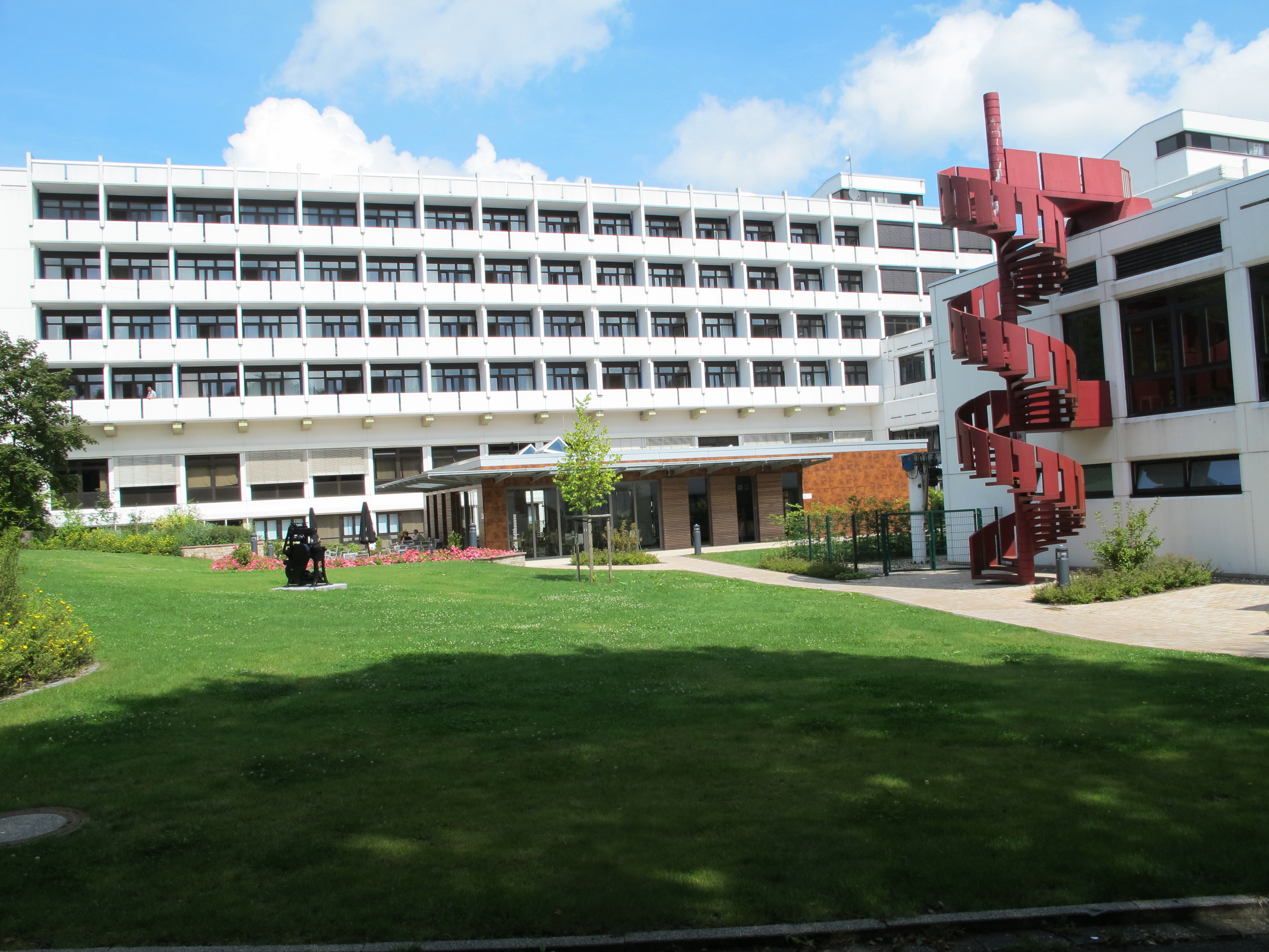 Klinik Königsfeld der Deutschen Rentenversicherung Westfalen in Ennepetal